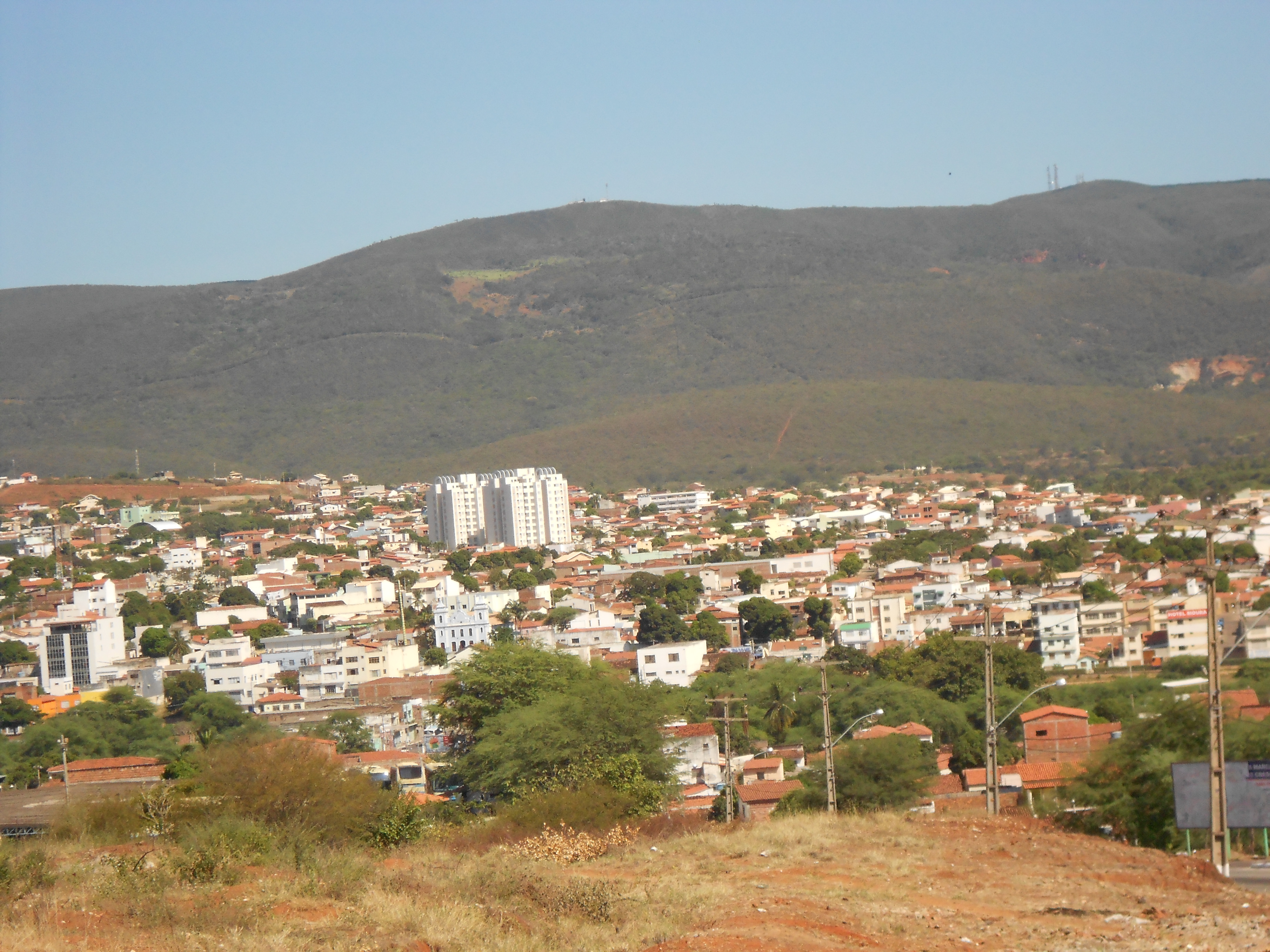 Brumado, bairro São Félix e parte do Centro.